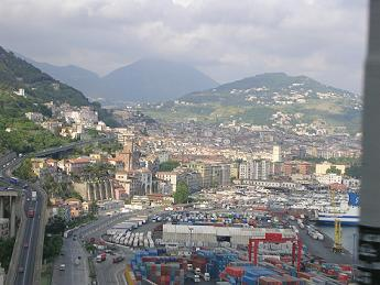 Salerno